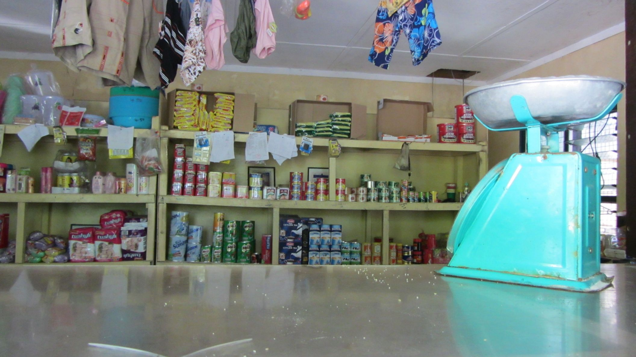 Typische Auswahl in einem Geschäft in Kiribati